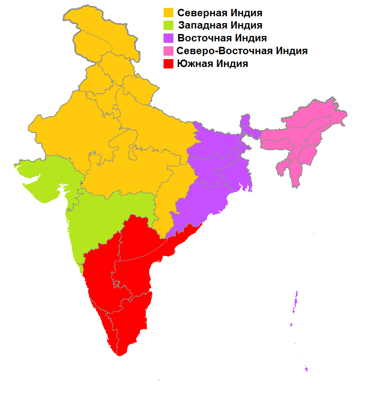 Северный, Западный, Восточный, Северо-Восточный и Южный регионы Индии